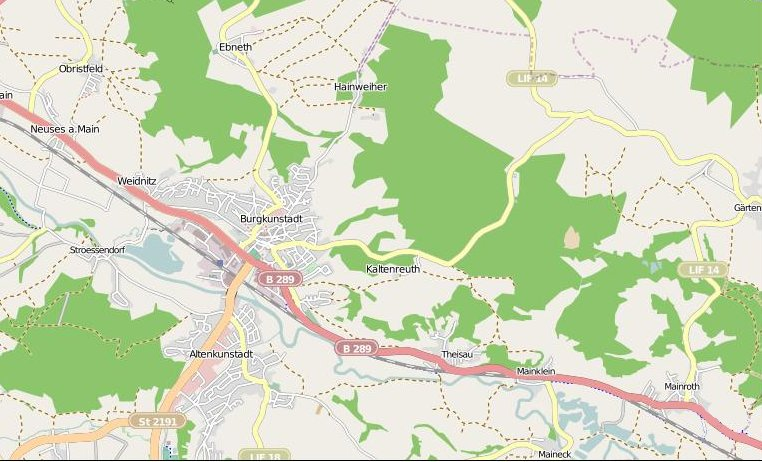 Screenshot des entsprechenden Bildausschnittes von